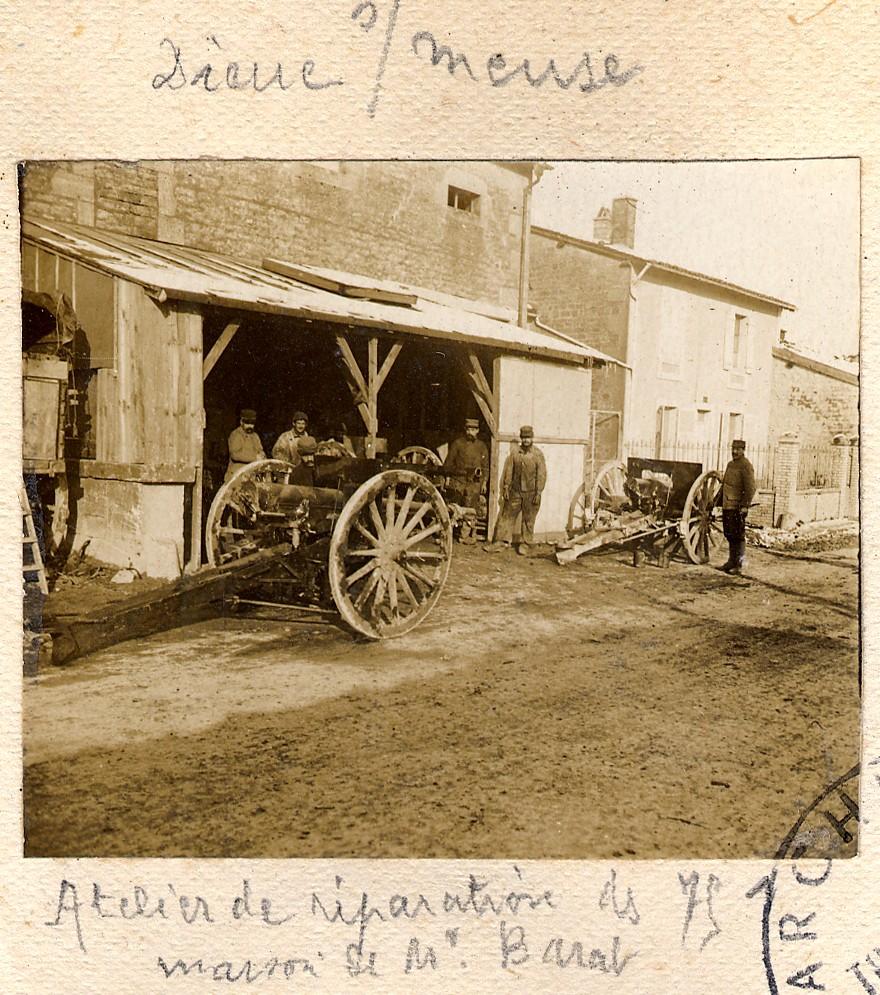 Photo de l'atelier de réparation de canons de 75 appartenant à M. Barat à Dieue-sur-Meuse (Meuse). Entre le 30 septembre 1916 et le 25 janvier 1917. Guerre 1914-1918.